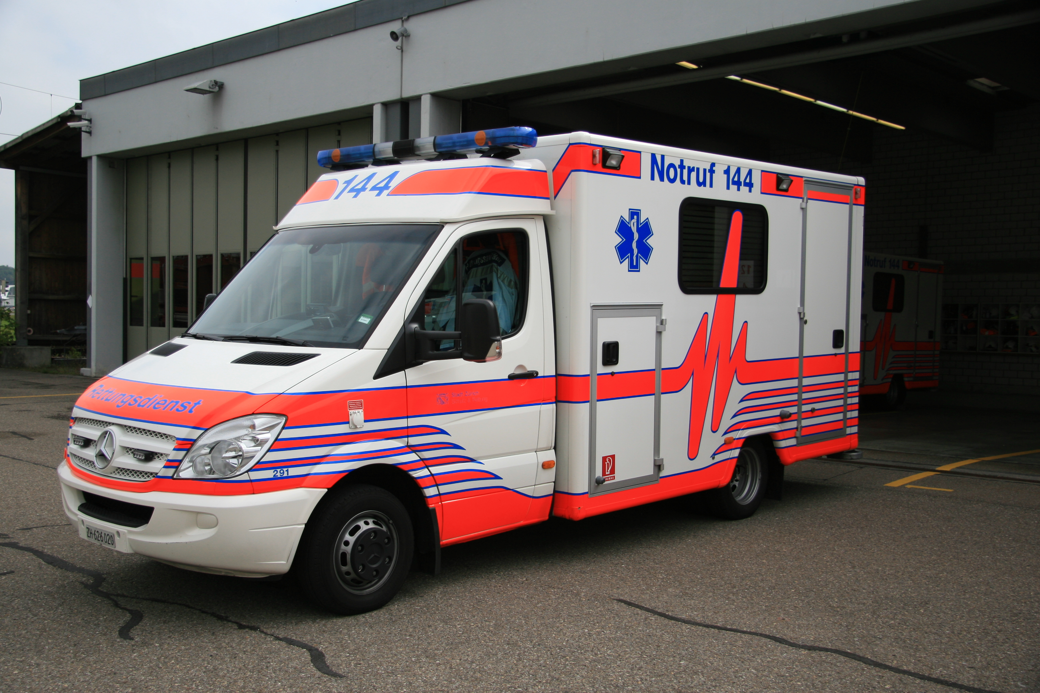 Rettungswagen (RTW) des Rettungsdienstes von Schutz & Rettung Zürich, Schweiz